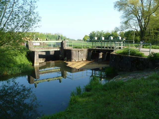 Die Pfinz unterquert den Pfinzentlastungskanal